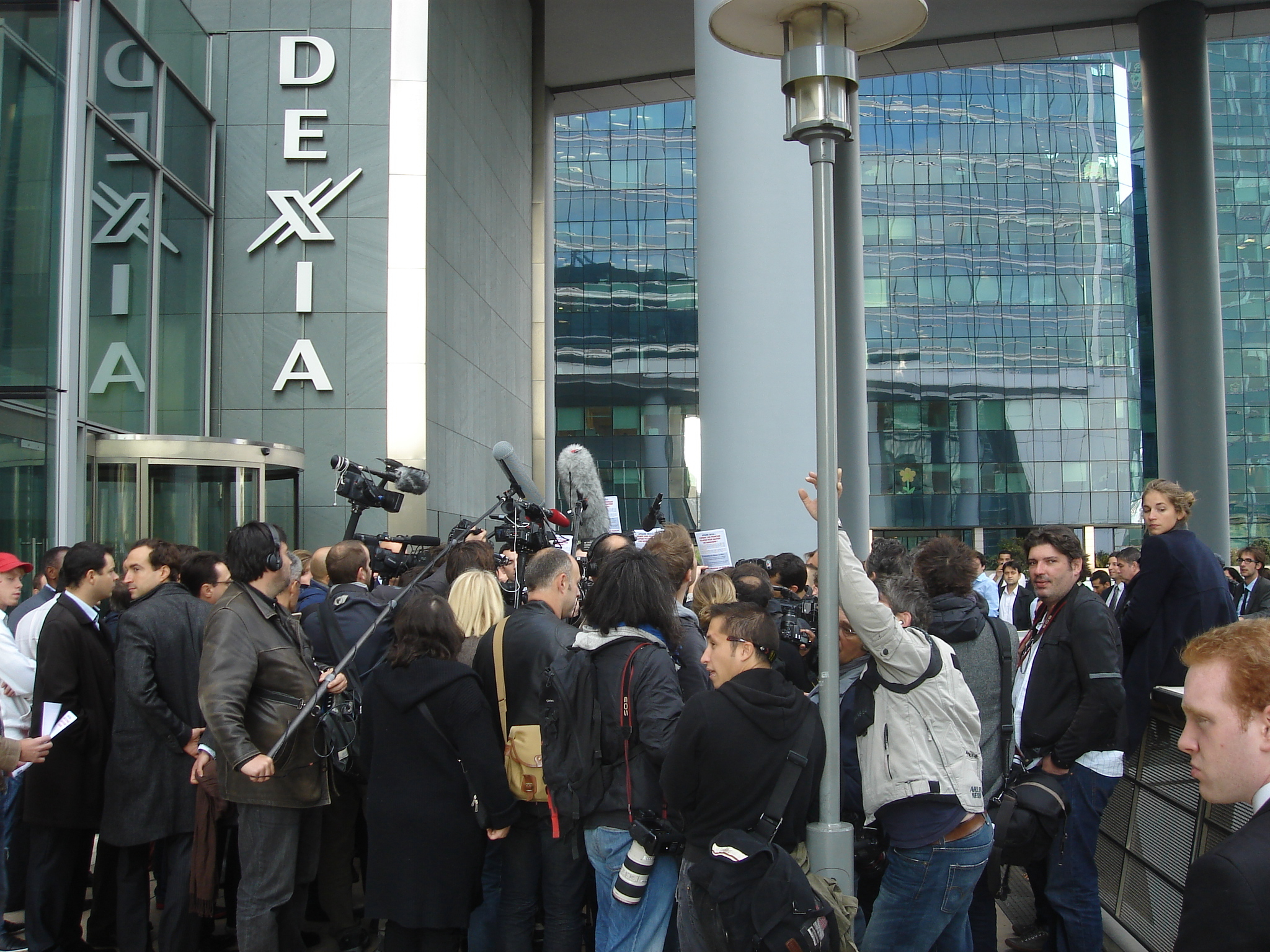 Marine Le Pen, conférence de presse à La Défense à Paris, devant la Tour Dexia le 17 octobre D011